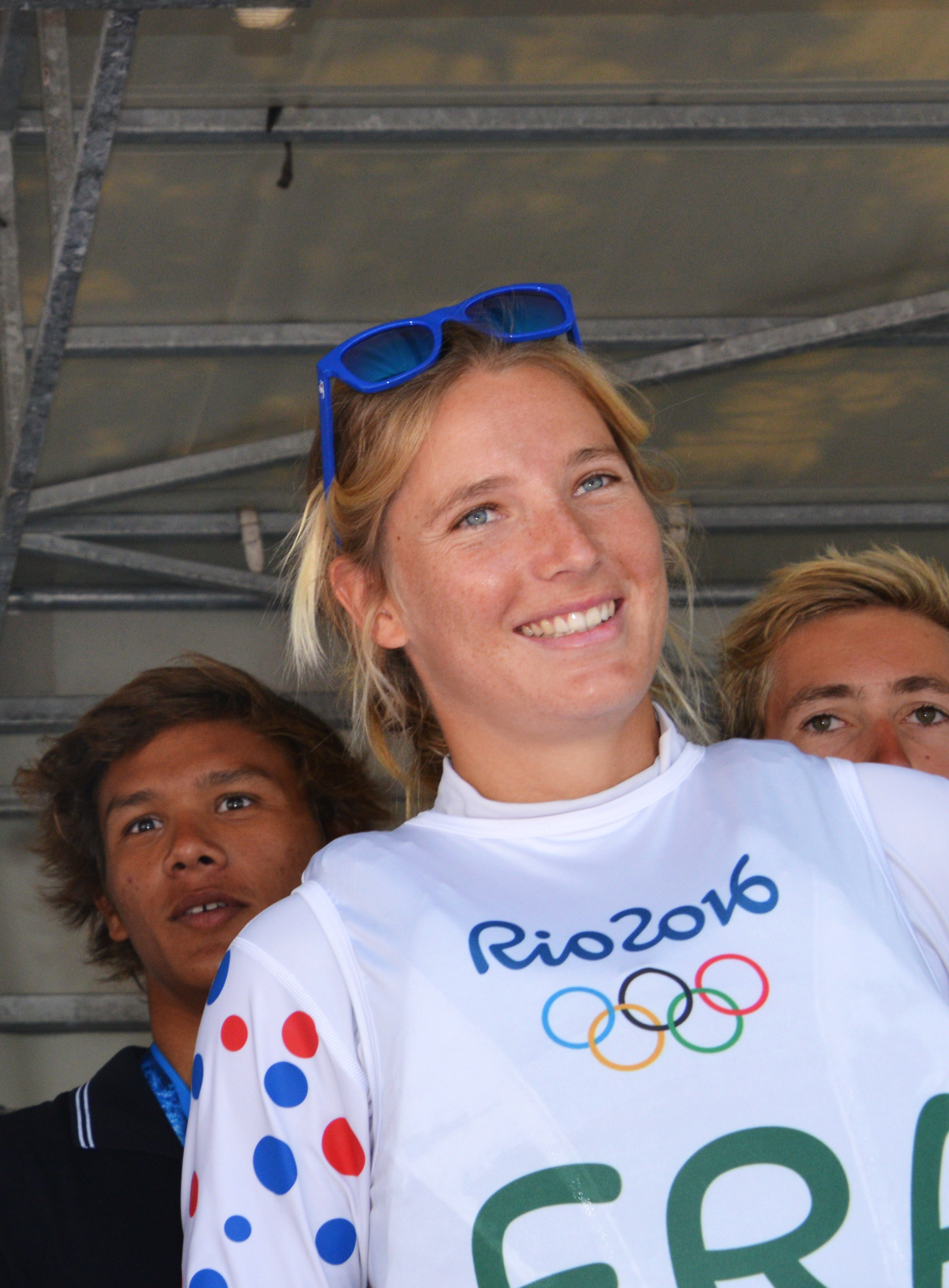 Mathilde de Kérangat (voile, laser radial) lors de l’accueil par La Rochelle des athlètes charentais-maritimes des Jeux Olympiques d’été 2016 de Rio de Janeiro. La Rochelle, Charente-Maritime, France.